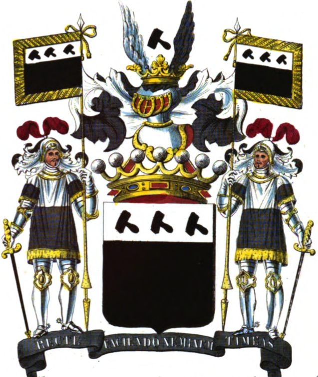 Armoiries de la famille van den Steen de Jehay